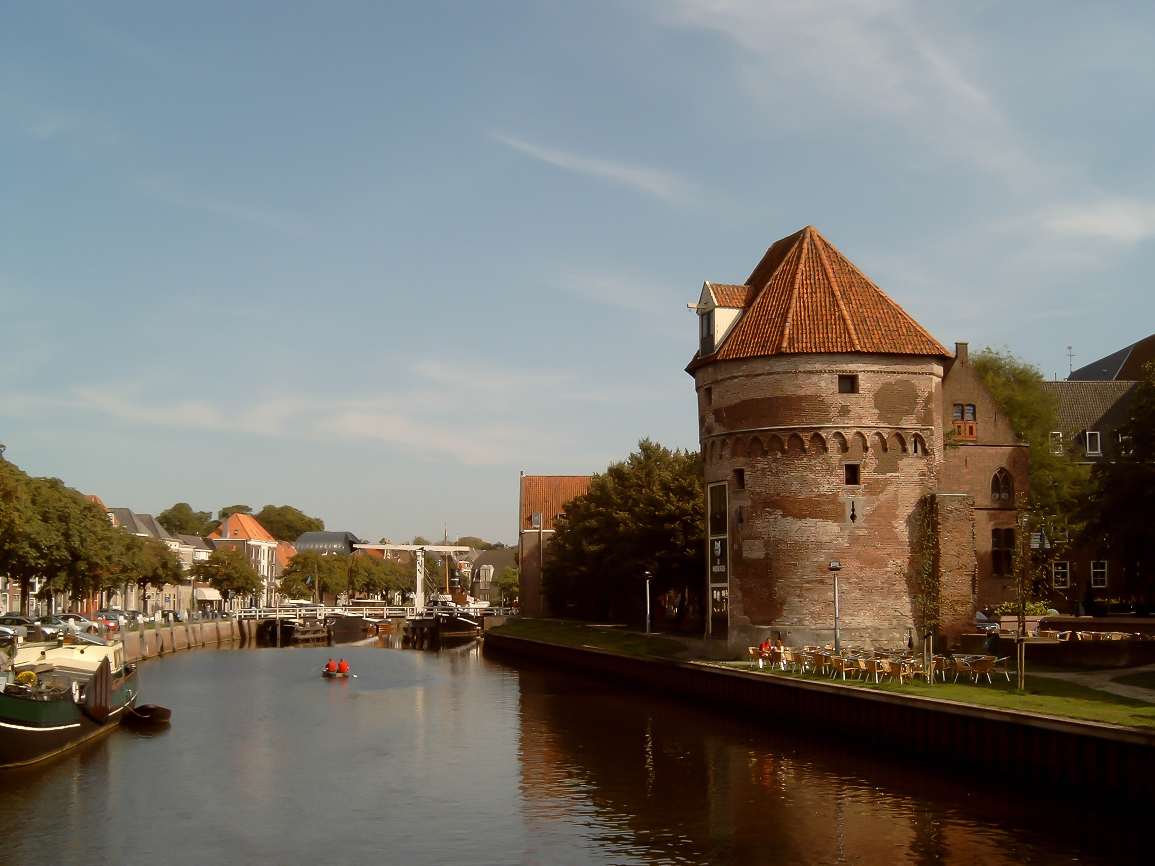 Zwolle, toren bij stadsmuur met vliet en brug